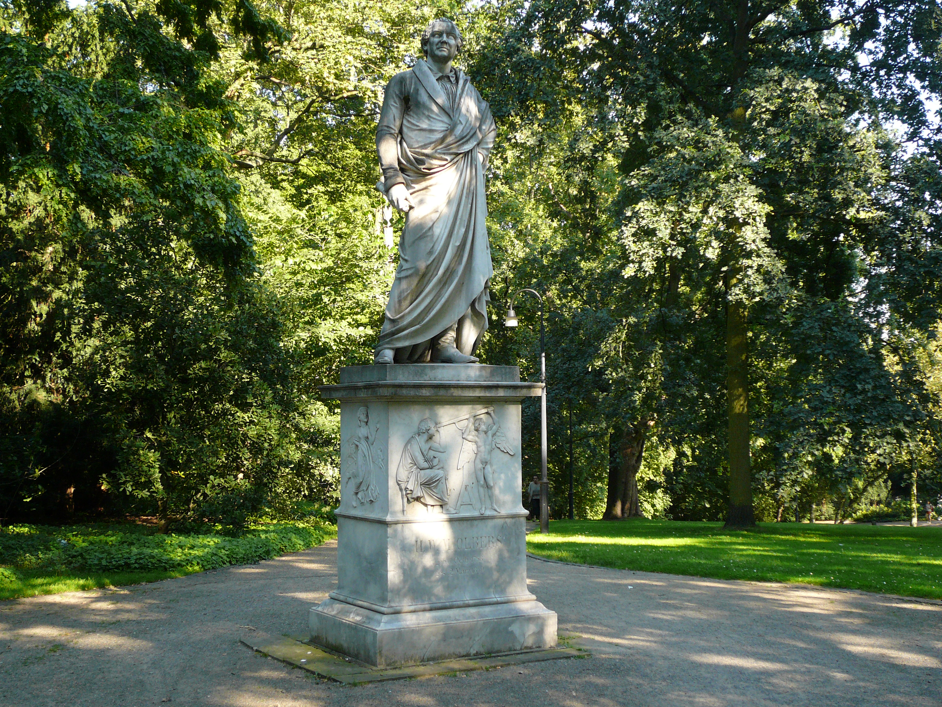 Das Olbers-Denkmal in Bremen Das abgebildete Objekt ist ein geschütztes Kulturdenkmal in der Freien Hansestadt Bremen, mit der Nr. 1193,T002 beim Landesamt für Denkmalpflege registriert.